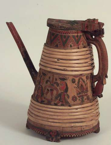 Tutekanne dekoret i sviteknikk og malt av Iver Gundersen Øvstrud, datert 1775. Norsk Folkemuseum, NF.1915-1103.